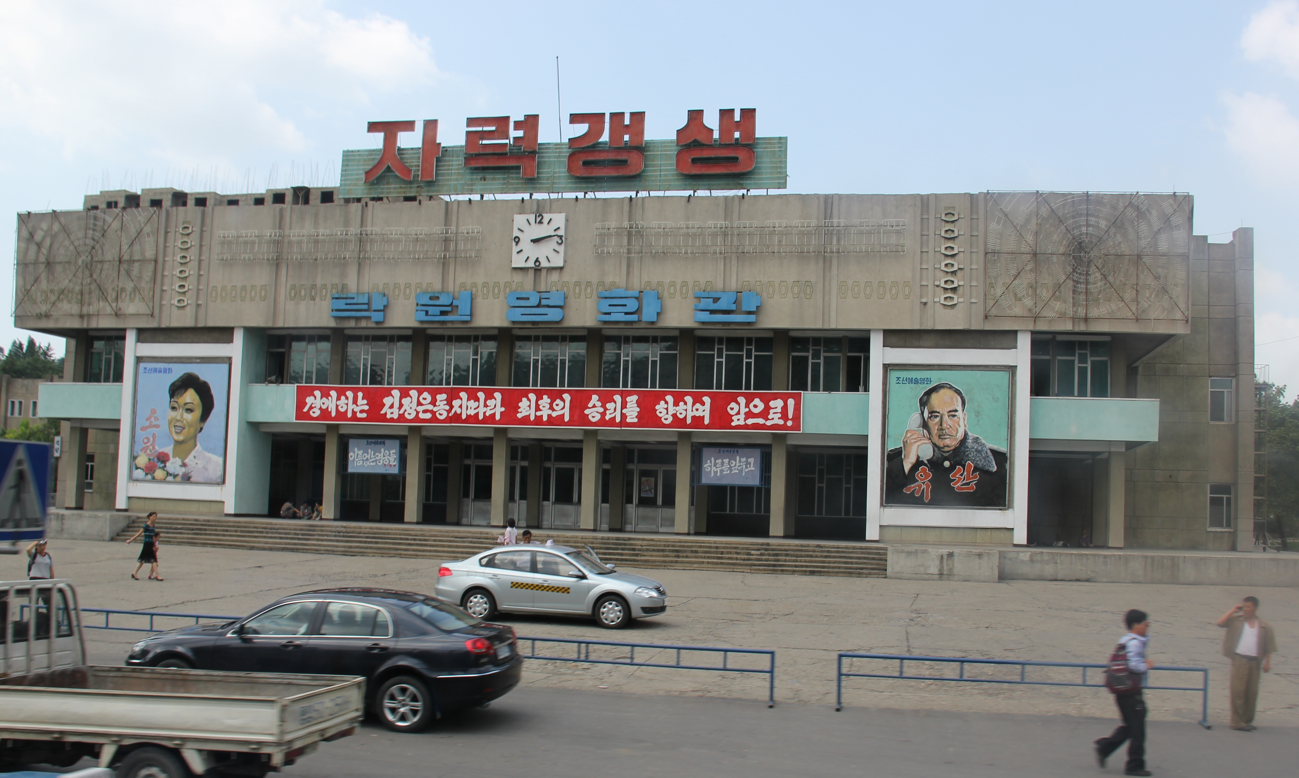 Kaeson Cinema